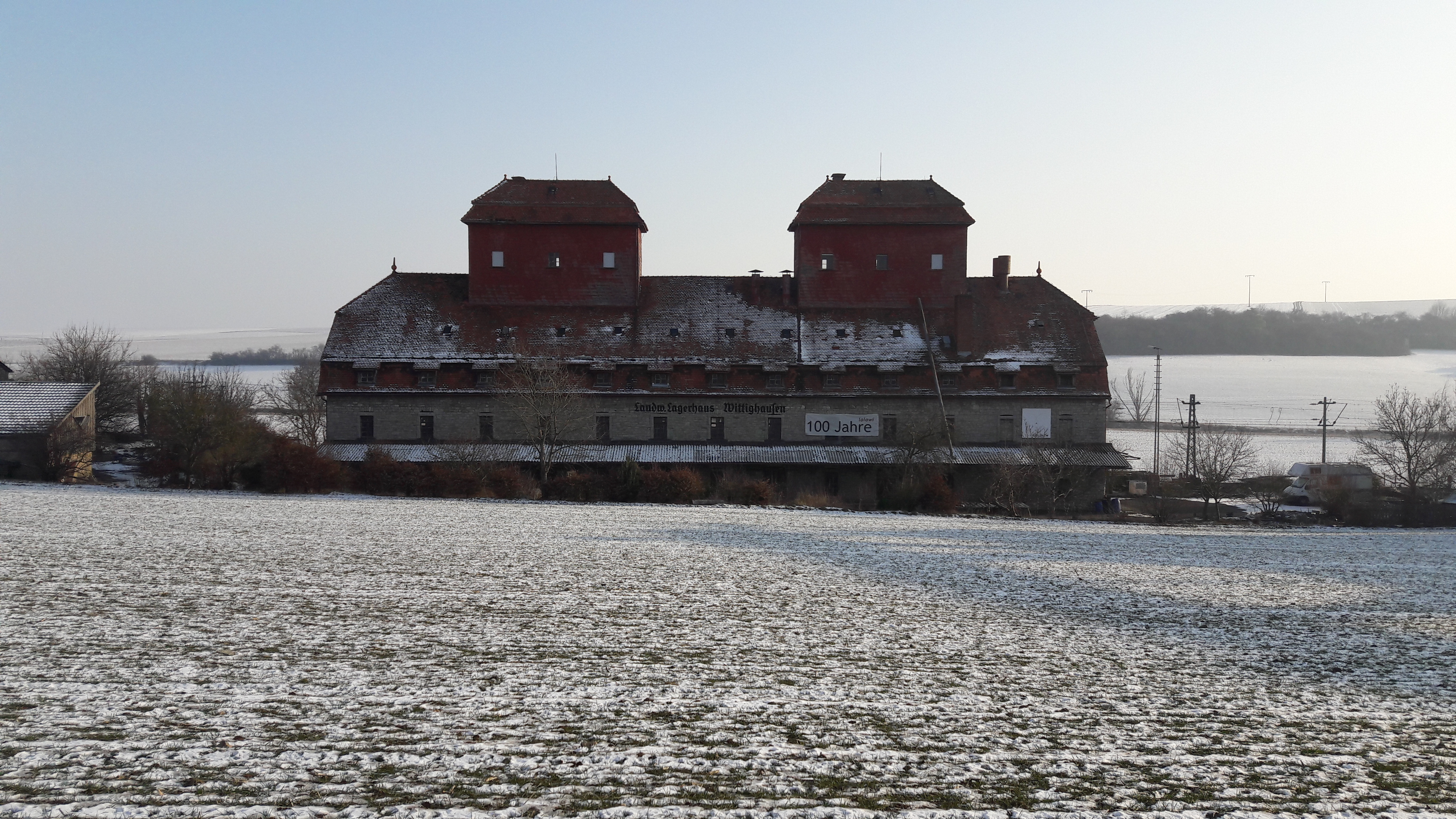 Am Katzenstein 4 (Oberwittighausen 2017)